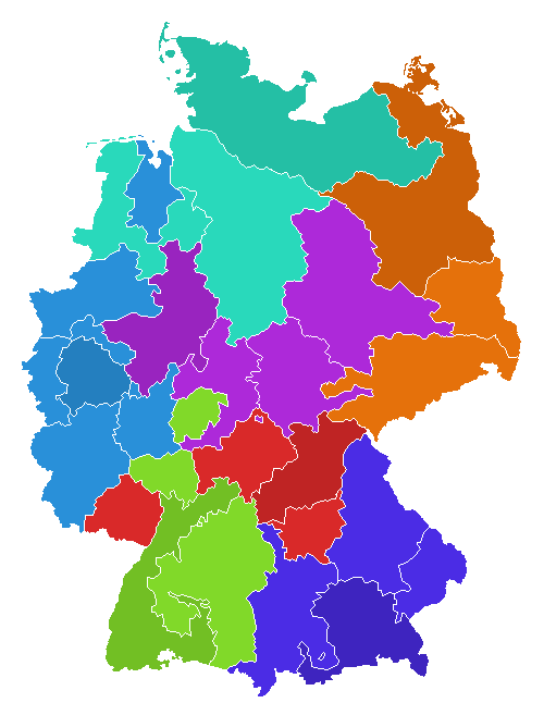 Katholische Diözesen in Deutschland Kann mMm Bild Deutsche bistuemer.png ersetzen.